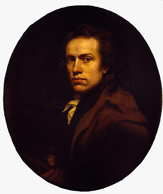 Self-portrait